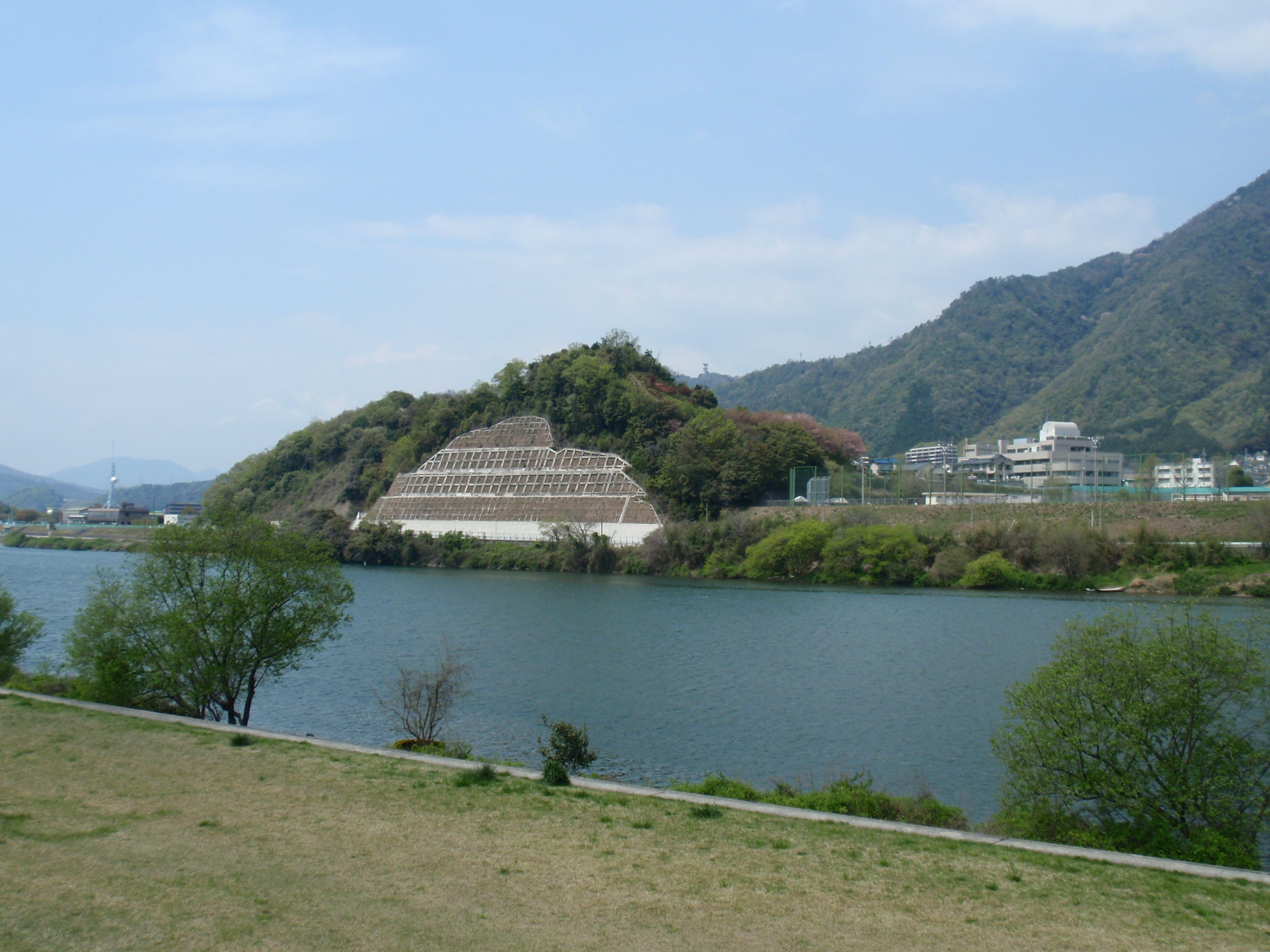 安芸国八木城遠景